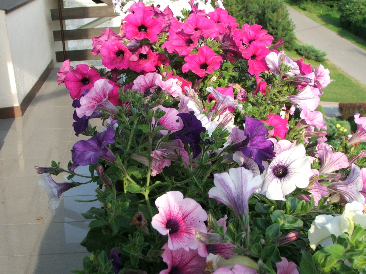 Petunia ×atkinsiana